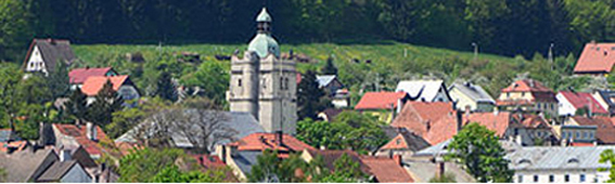 Złty Stok, panorama miasta